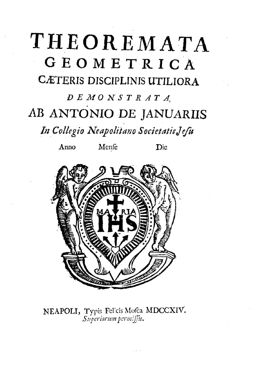 Theoremata geometrica caeteris disciplinis utiliora demonstrata ab Antonio De Januariis in Collegio neapolitano Societatis Iesu Anno mense die. - Neapoli : typis Felicis Mosca, 1714. - 61, [3] p. : [12] c. di tav. ; 4º .